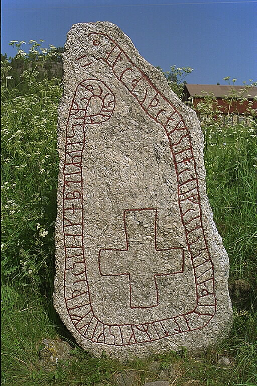 RAÄ-nummer Njurunda 173:1. Inskriften lyder: Altrud och Sigrev reste denna sten efter Gisking (?), sin fader, och efter Dis sin moder. Njurunda 173:1